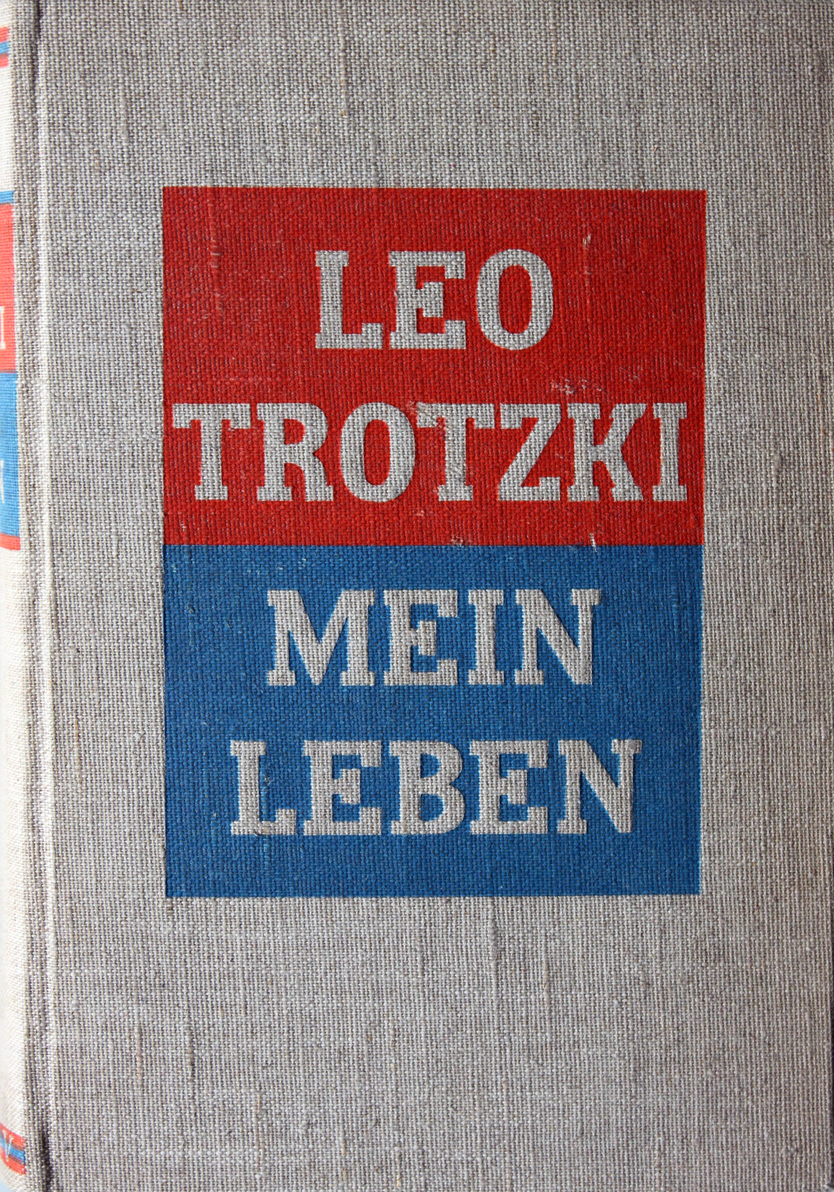 Троцкий - Моя жизнь, Т. I - 1930, обложка немецкого издания